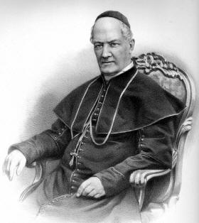 Cardinale Mario Mattei